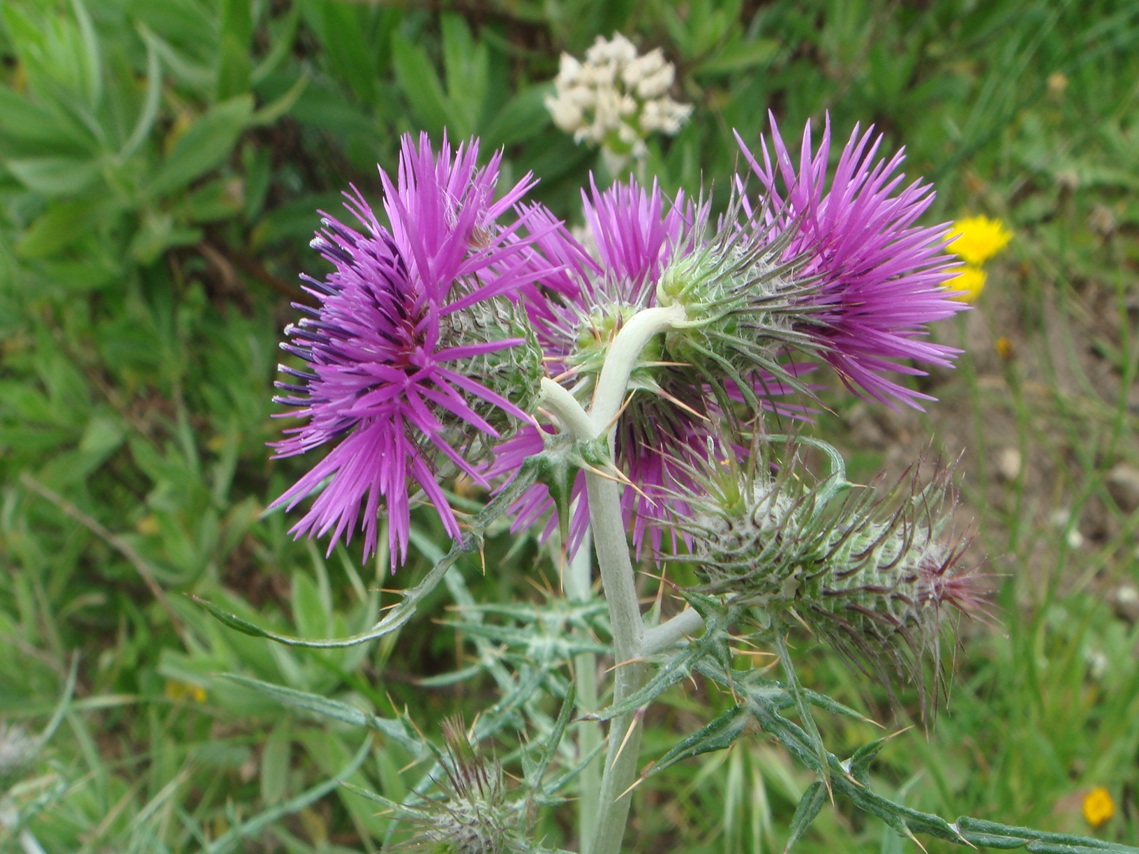 Galactites elegans, Ceuta, (España)